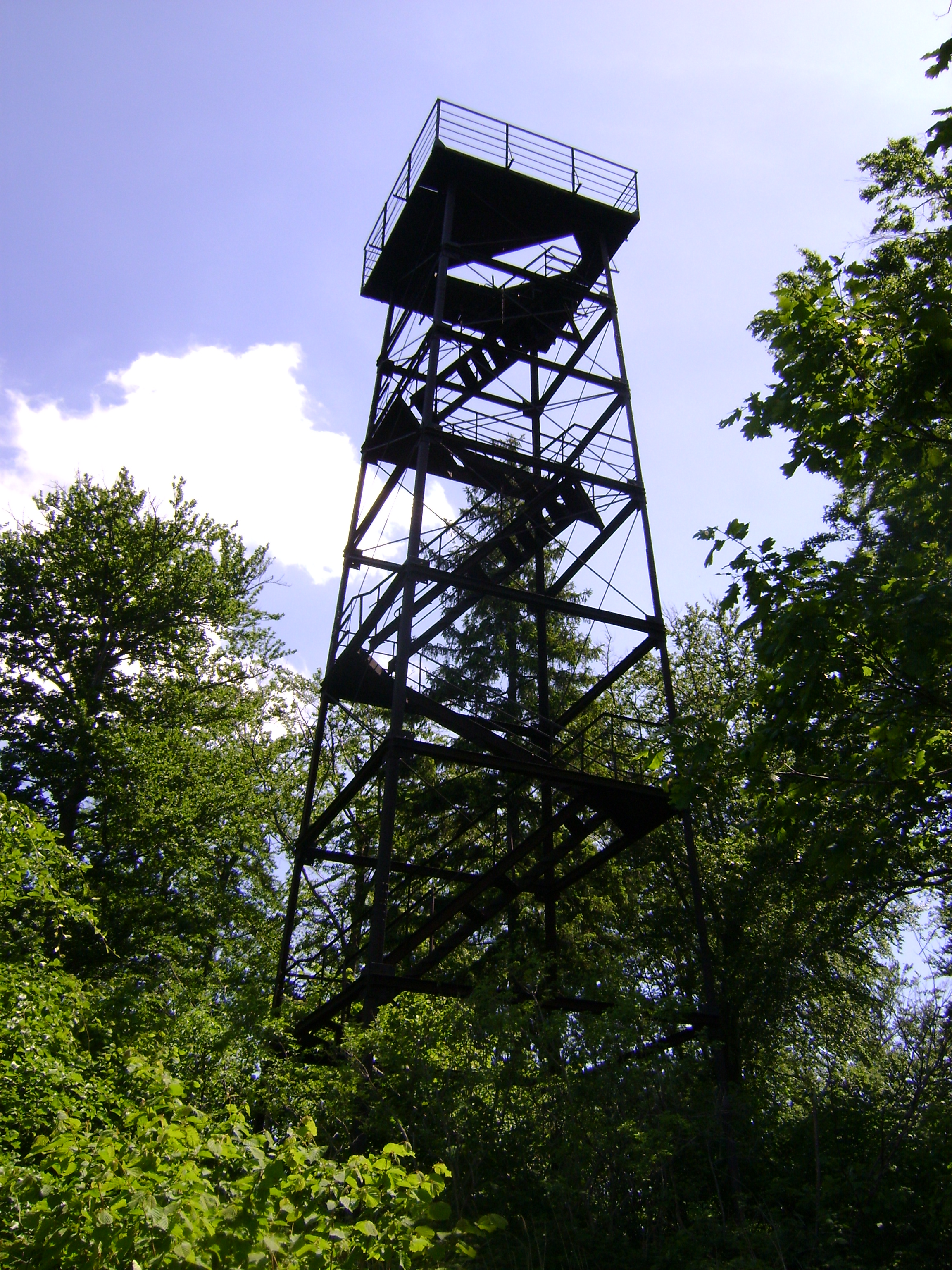 Wieża na wzniesieniu Ostra Góra w południowo-zachodniej Polsce, na Wzgórzach Dębowych. Na wschód od Niemczy